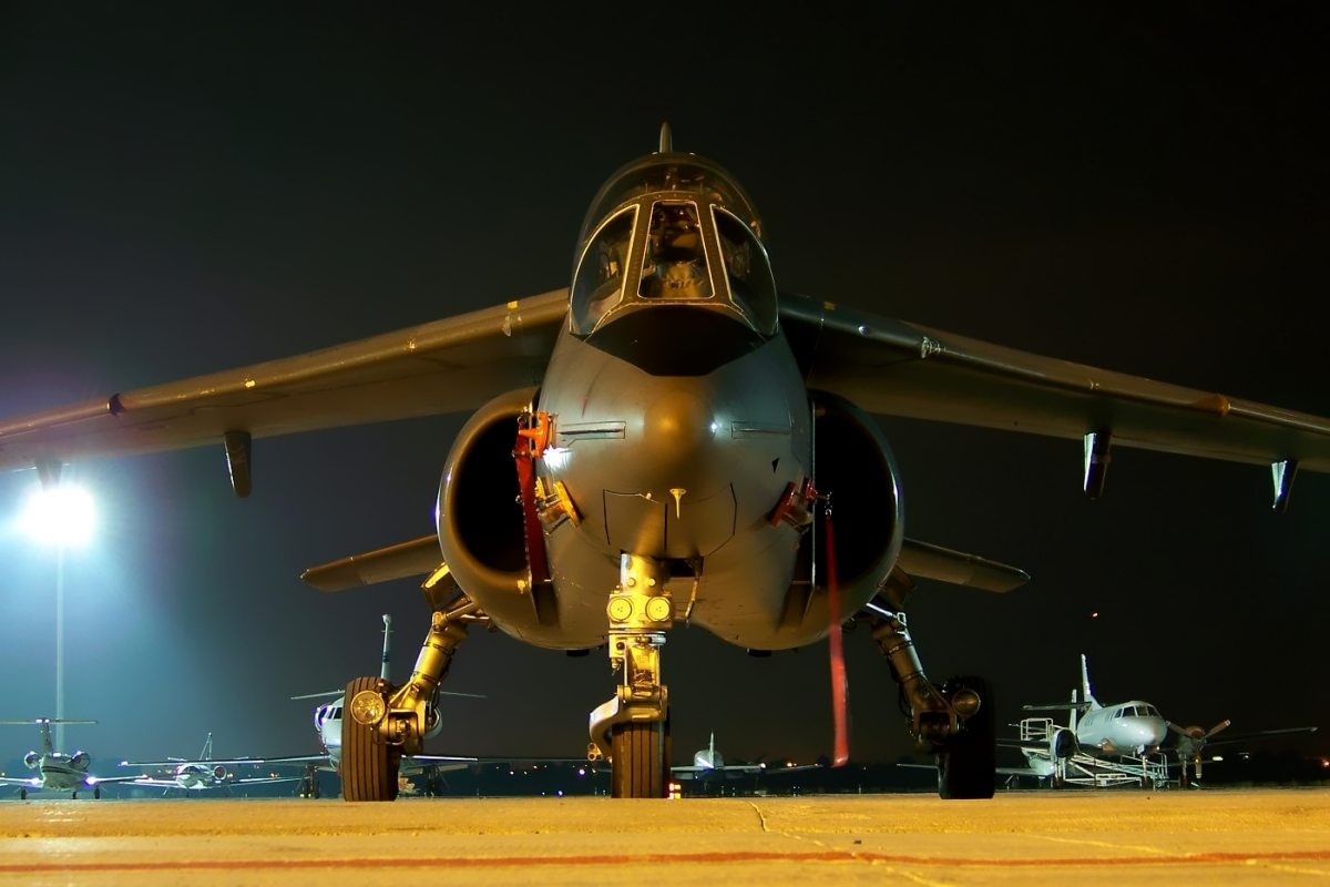 Esperando su actuación para las fiesta del Cel de la Merce, Barcelona, España. French Air Force Dassault Dornier Alpha Jet E BCN / LEBL 2006 Septiembre 29